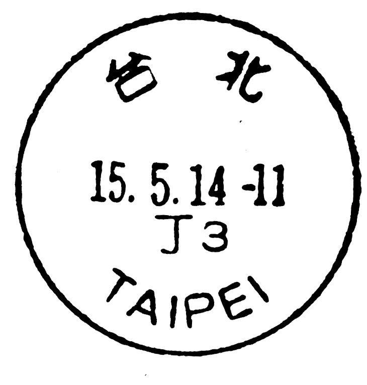 中文（中国大陆）: 2014年5月15日台北丁3邮戳